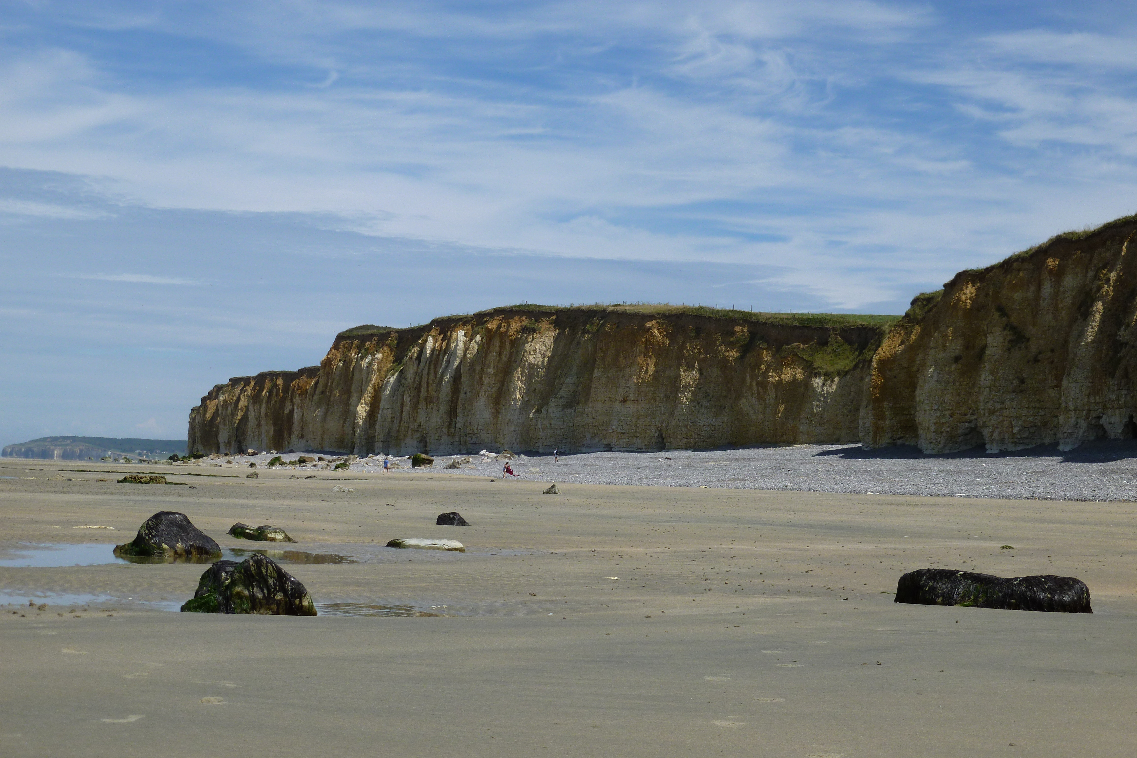 Falaises depuis la plage de Sotteville-sur-Mer (Côte d'Albâtre, Haute-Normandie)